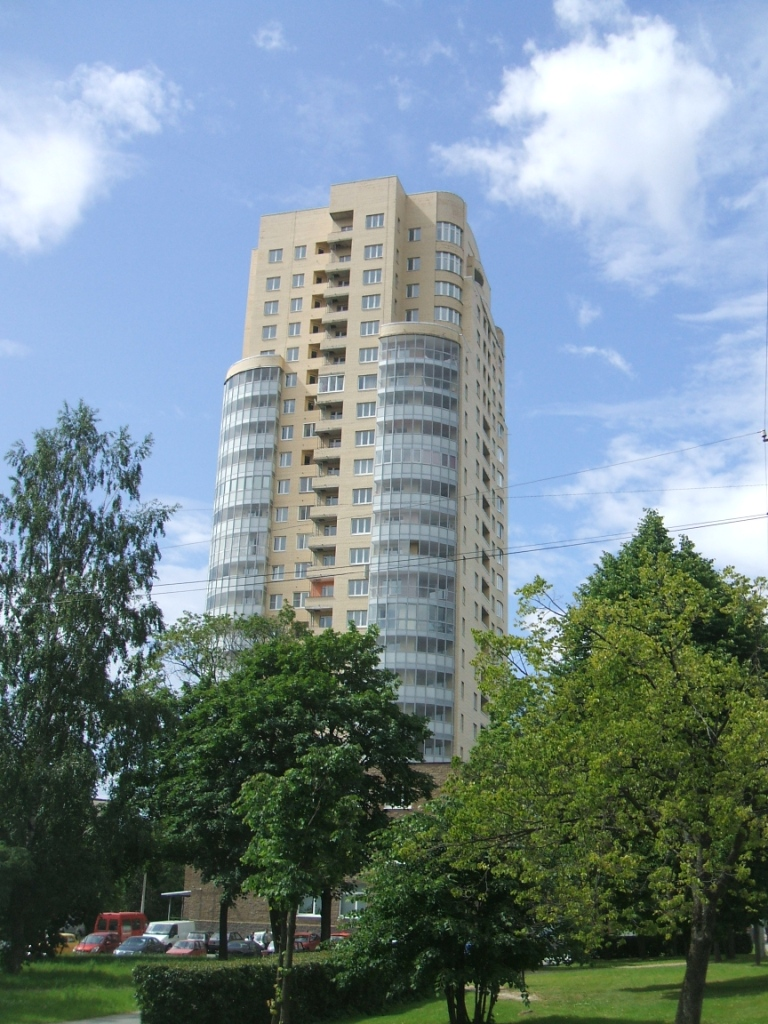 Самый высокий дом в Сестрорецке СПб на 2009 год. Воскова д.5.